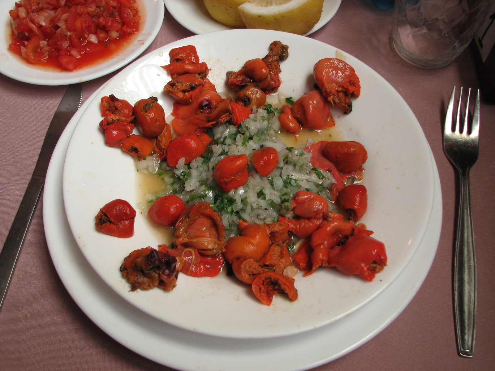 Assiette de «piure» à Valparaiso (Chili)